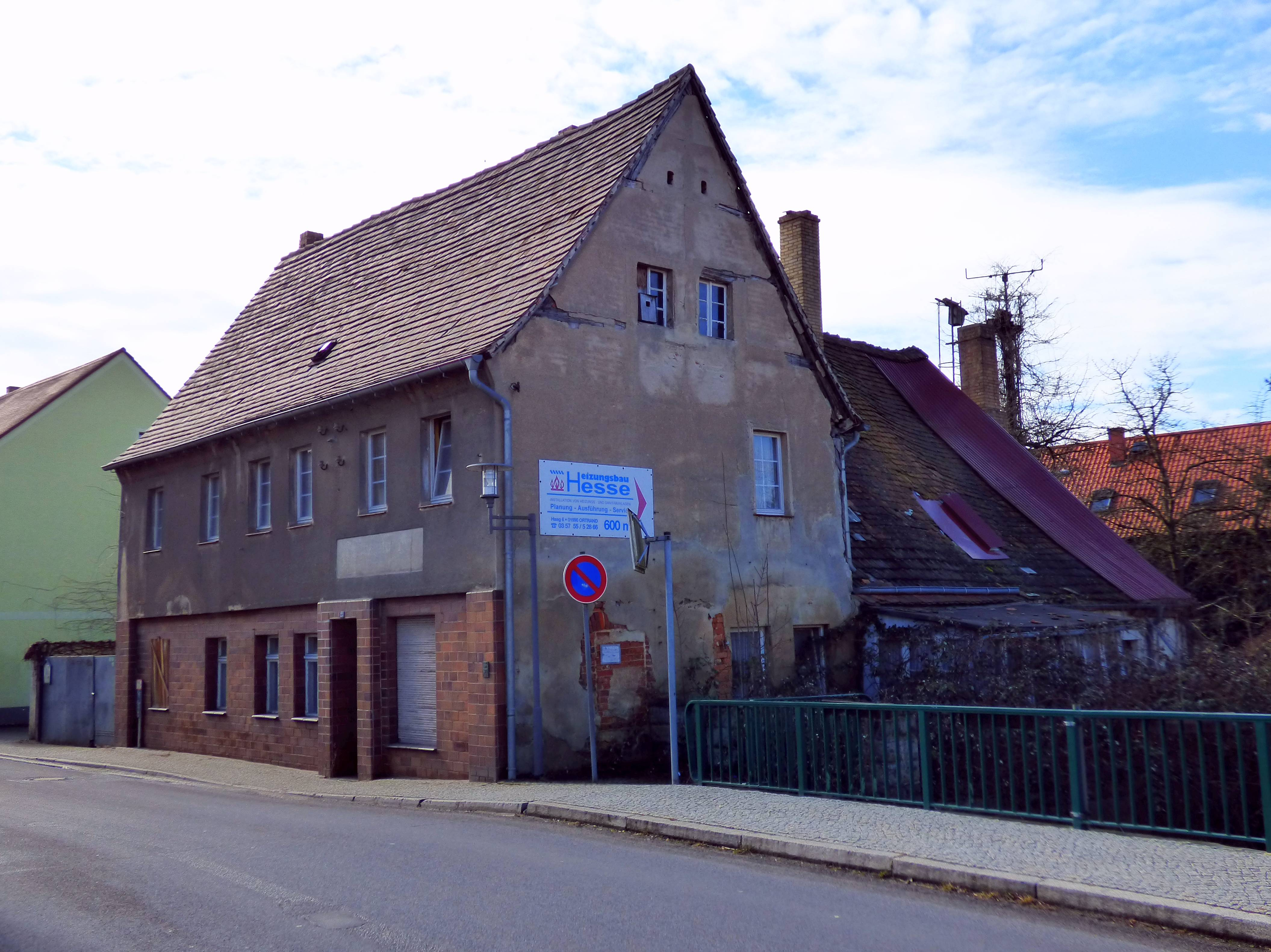 Ehemalige Färberei Hauptvogel in Ortrand an der Straße der Einheit 23 - Baudenkmal